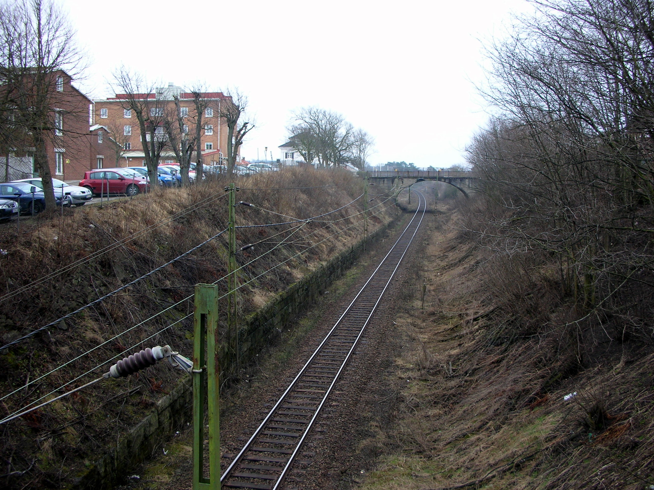 Den enkelspåriga Västkustbanan genom Varberg 2010.